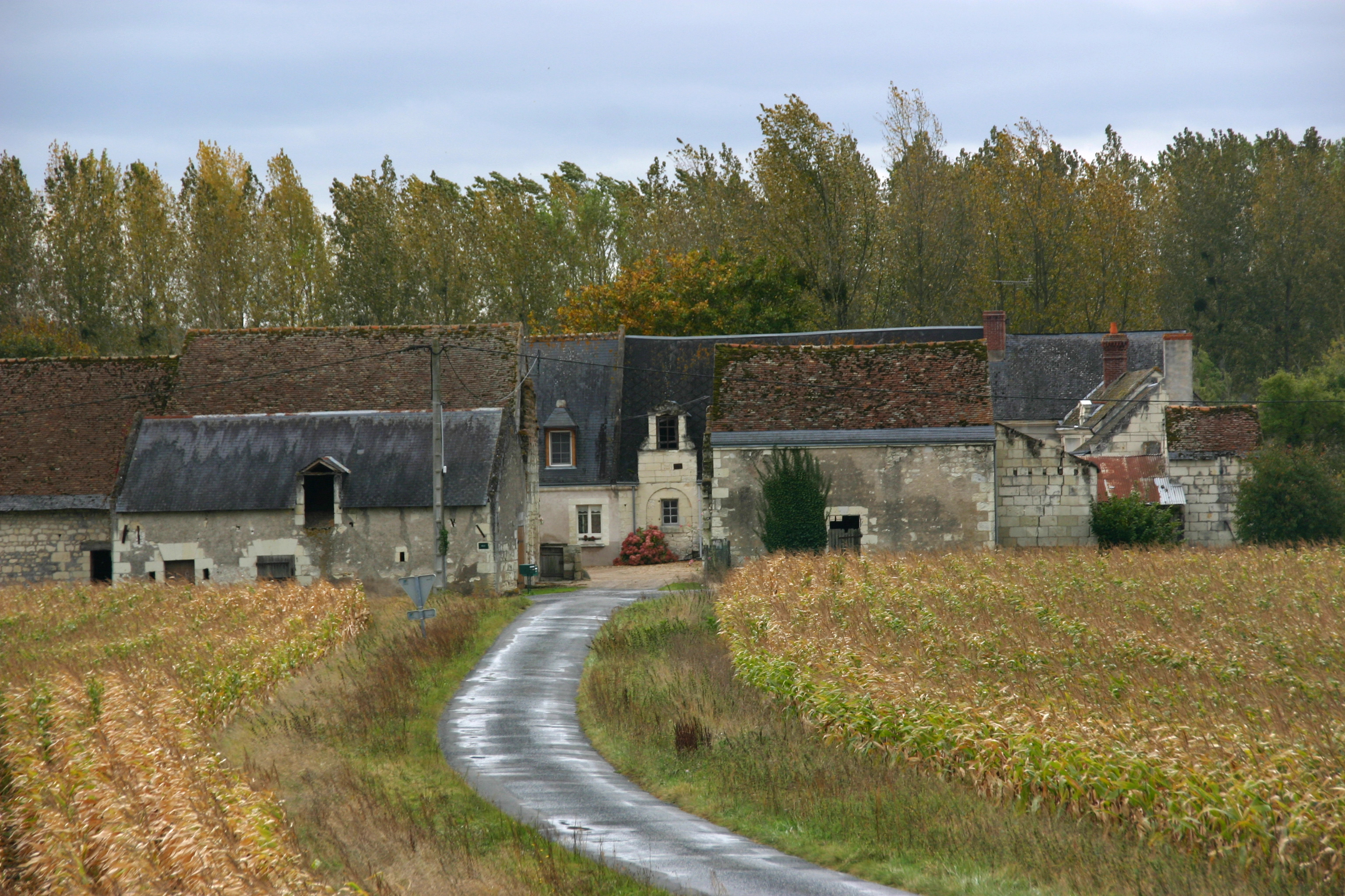 Bréhémont